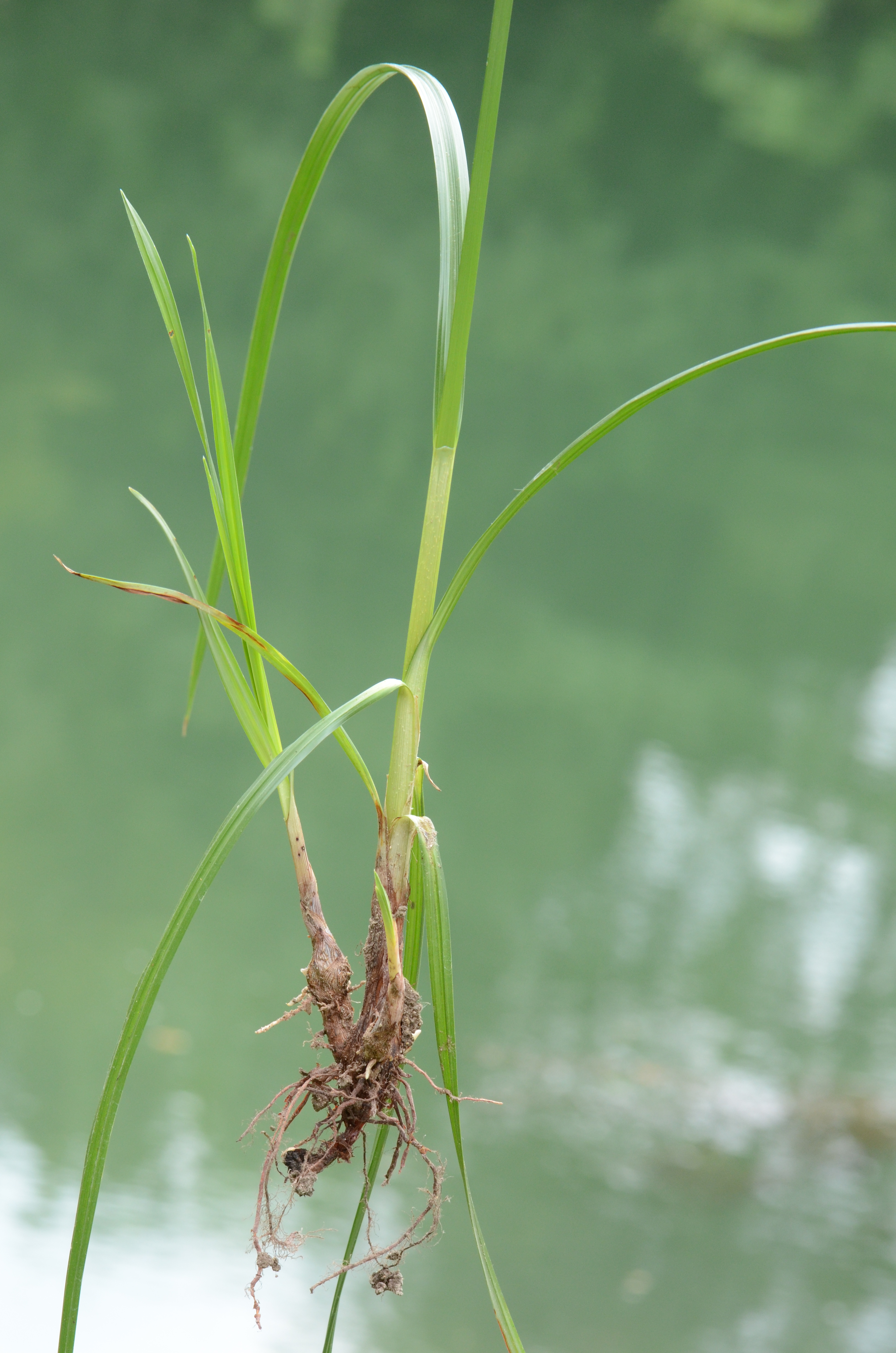 Cyperus longus, bord de la Charente, Cognac